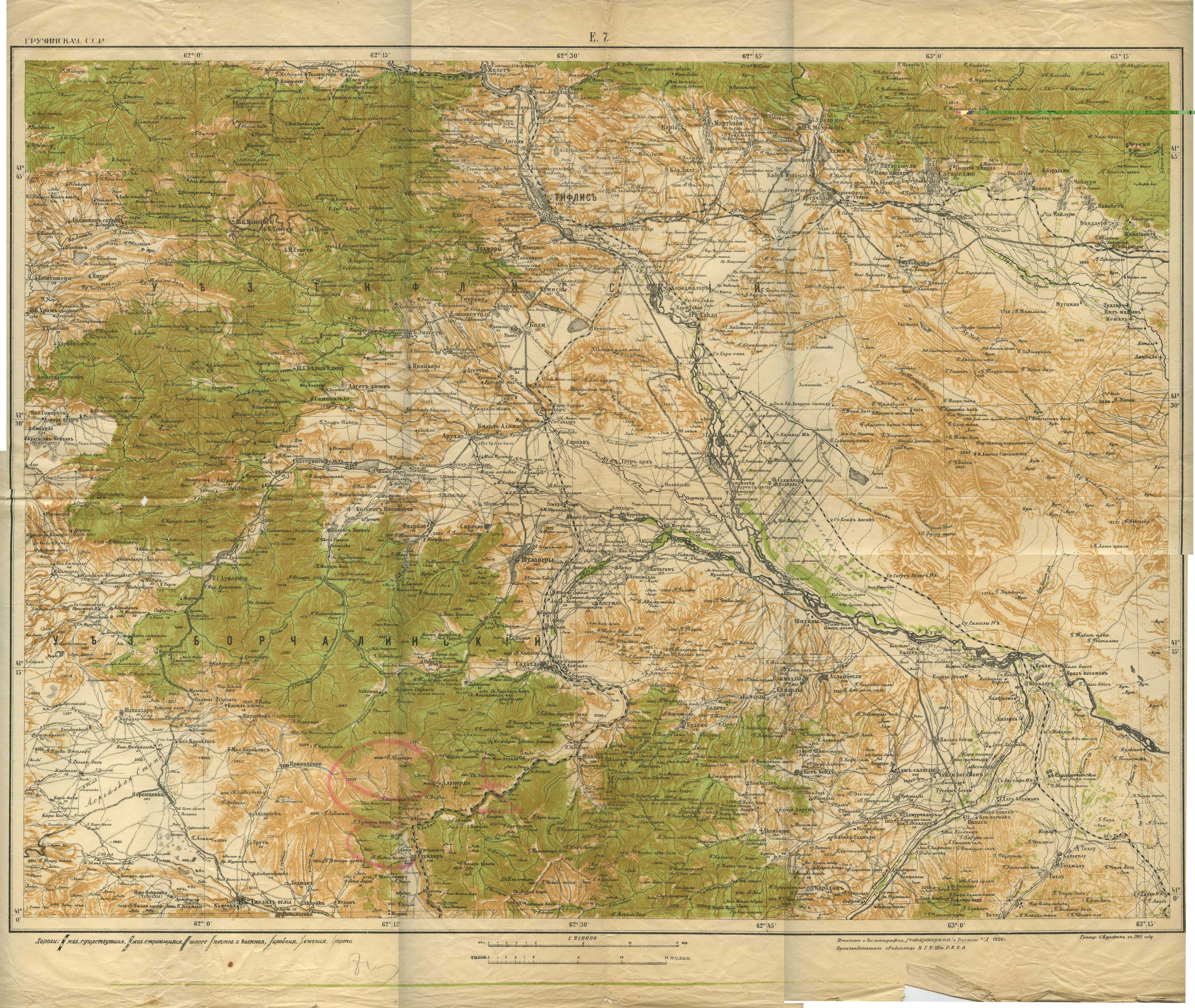 Военно-топографическая карта Кавказского края - лист E. 7. (1926)